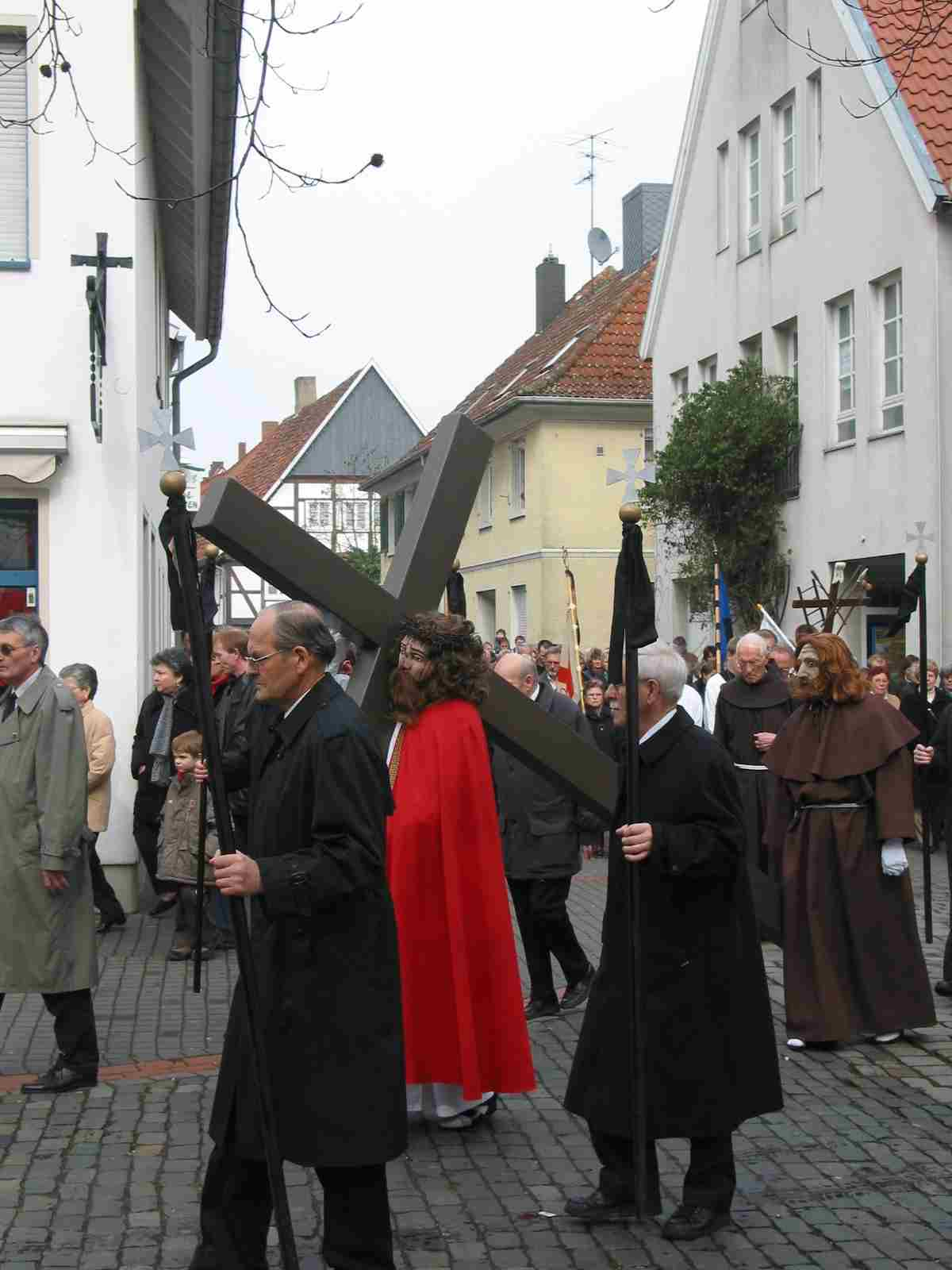 "Karfreitagsprozession Wiedenbrueck: Ecke Klingelbrink"